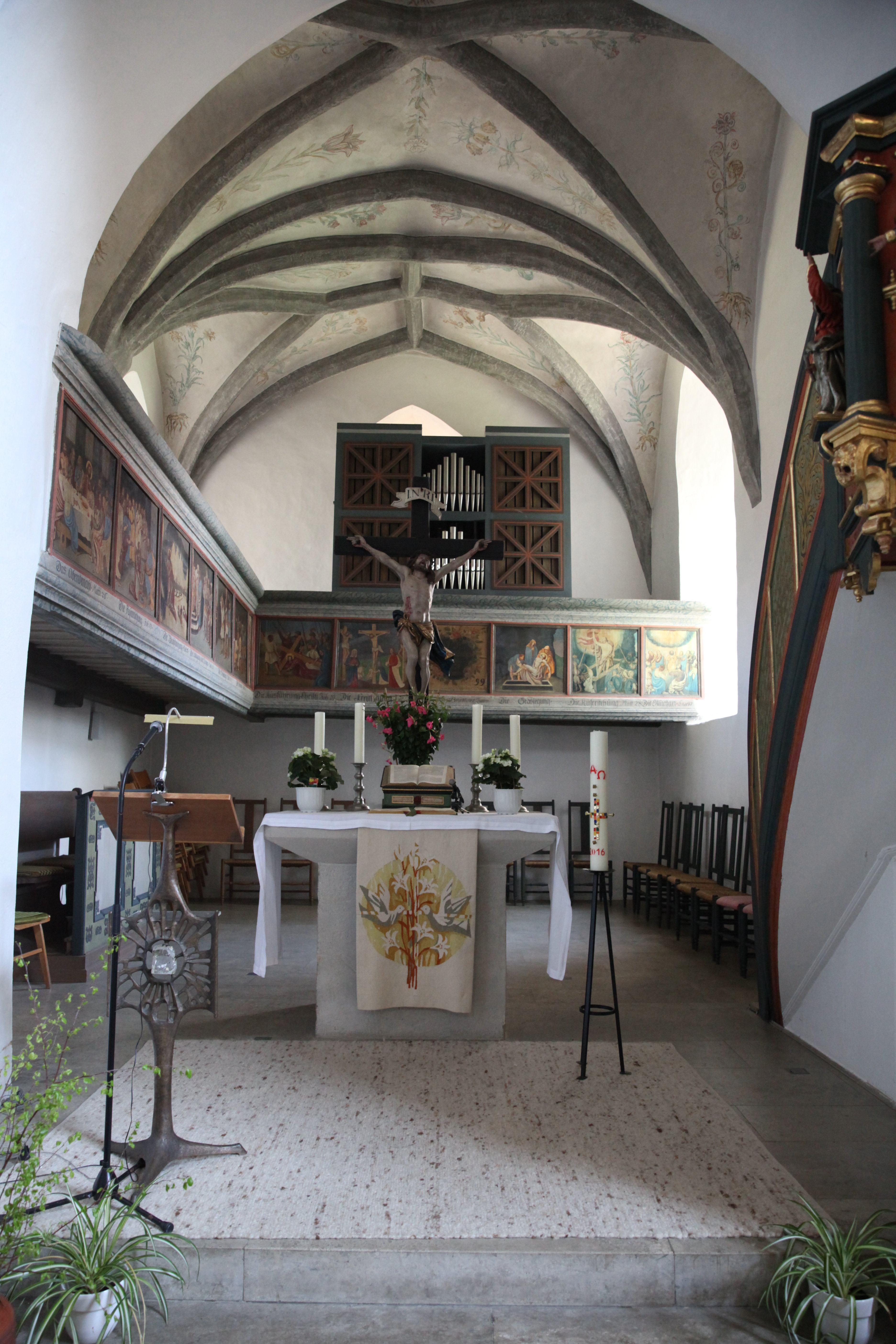 Chor, Evangelische Pfarrkirche Großgarnstadt